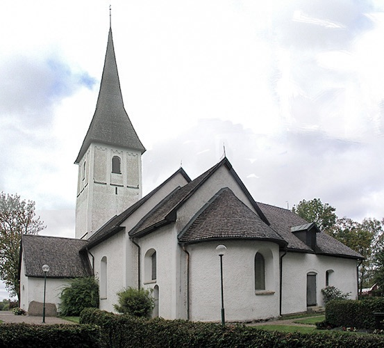 Kaga kyrka, Diocese of Linköping, Sweden.